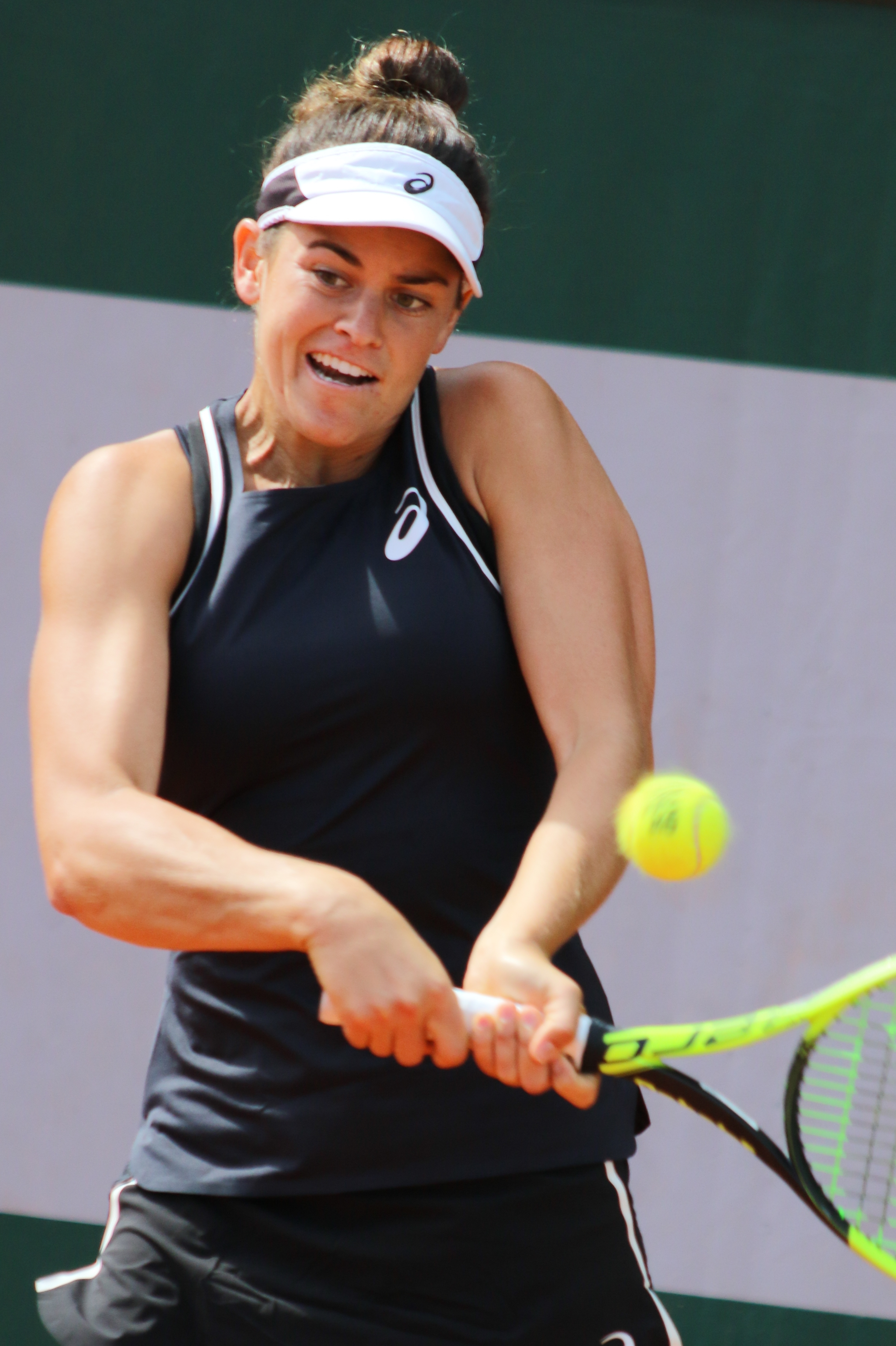 Brady RG18 (3)